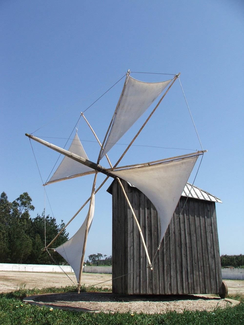 Moinho giratório em madeira, localizado no Bom Sucesso, concelho da Figueira da Foz.